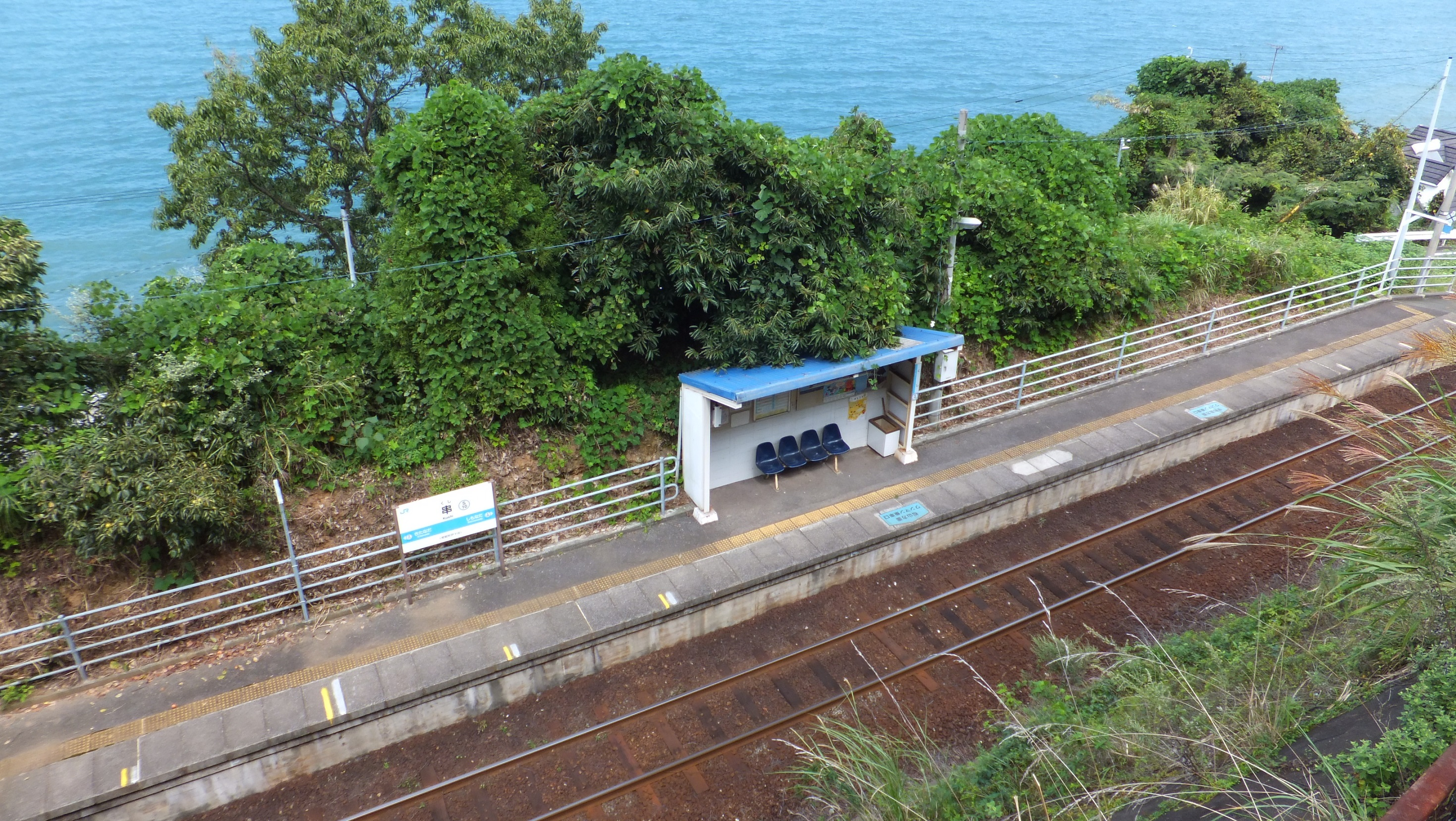 JR四国 予讃線（愛ある伊予灘線）串駅（2015年10月 愛媛県伊予市）